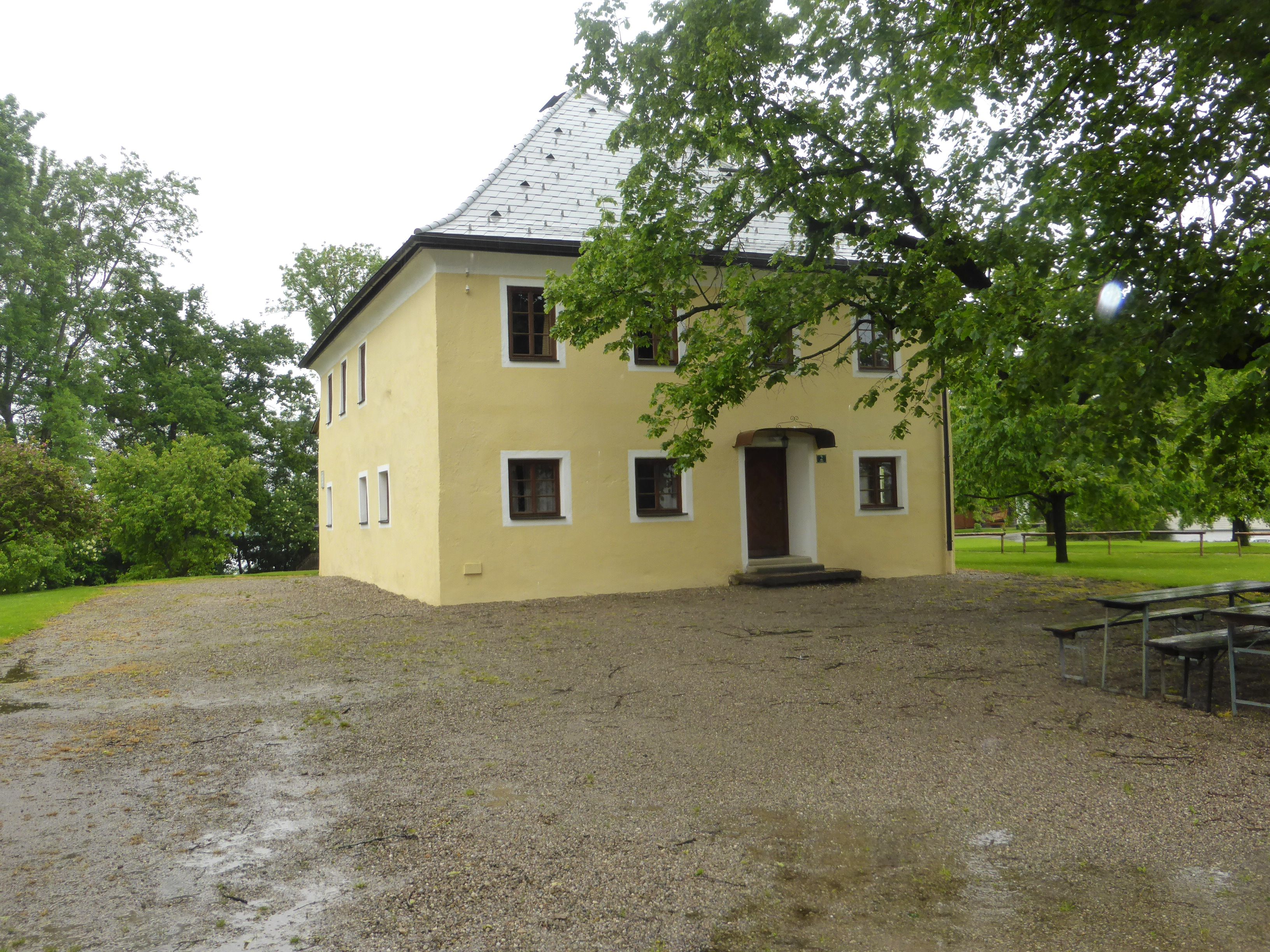 Gesamtanlage Zellhof